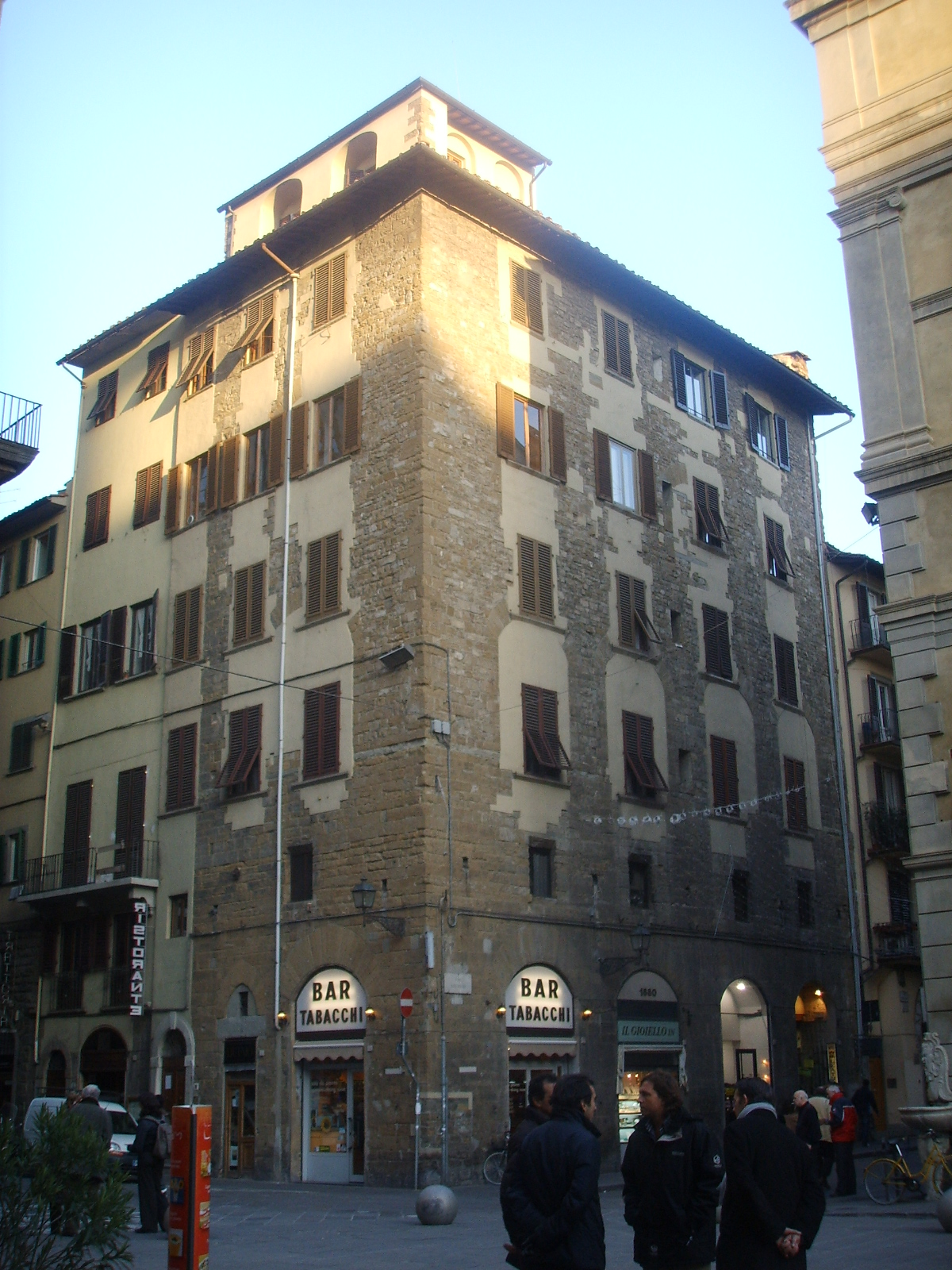 Torre_dei_Filipetri in Florence, Italy